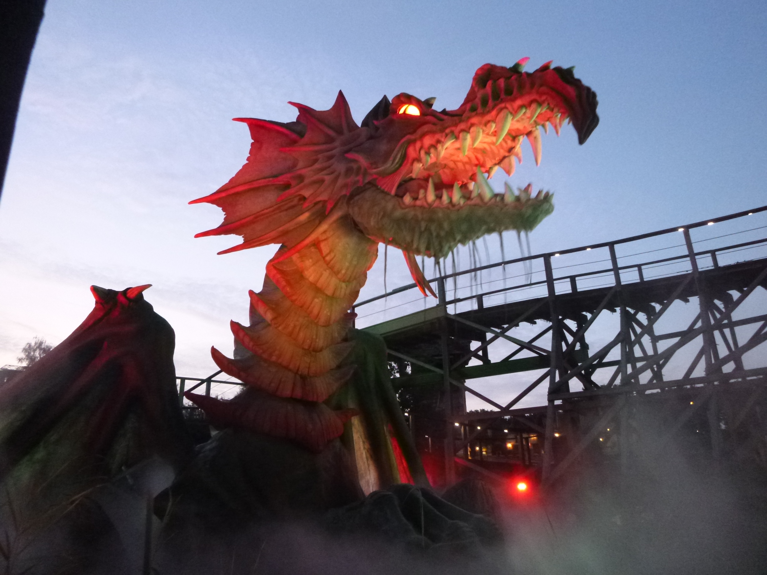 Le dragon de Joris en de draak en soirée à Efteling